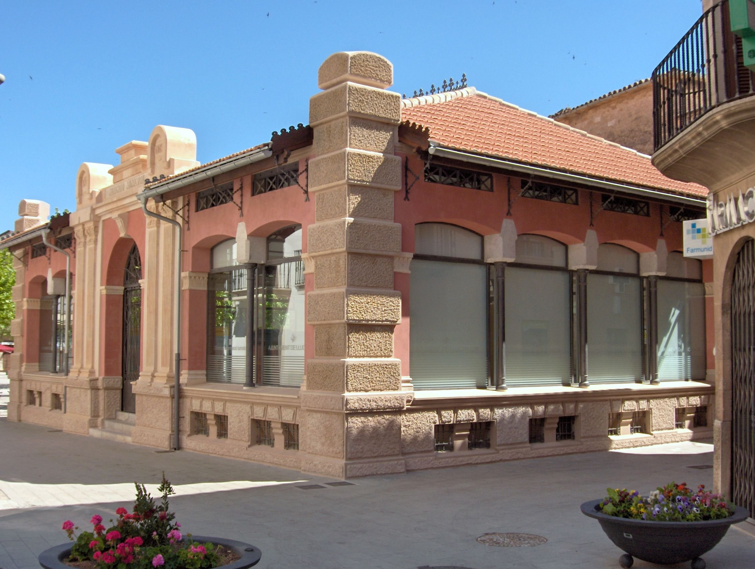 Antic Mercat Municipal i Peixeteria de Llucmajor (Mallorca). Actualment destinat a oficina d'atenció al ciutadà i al turista. Restaurat el 2010.